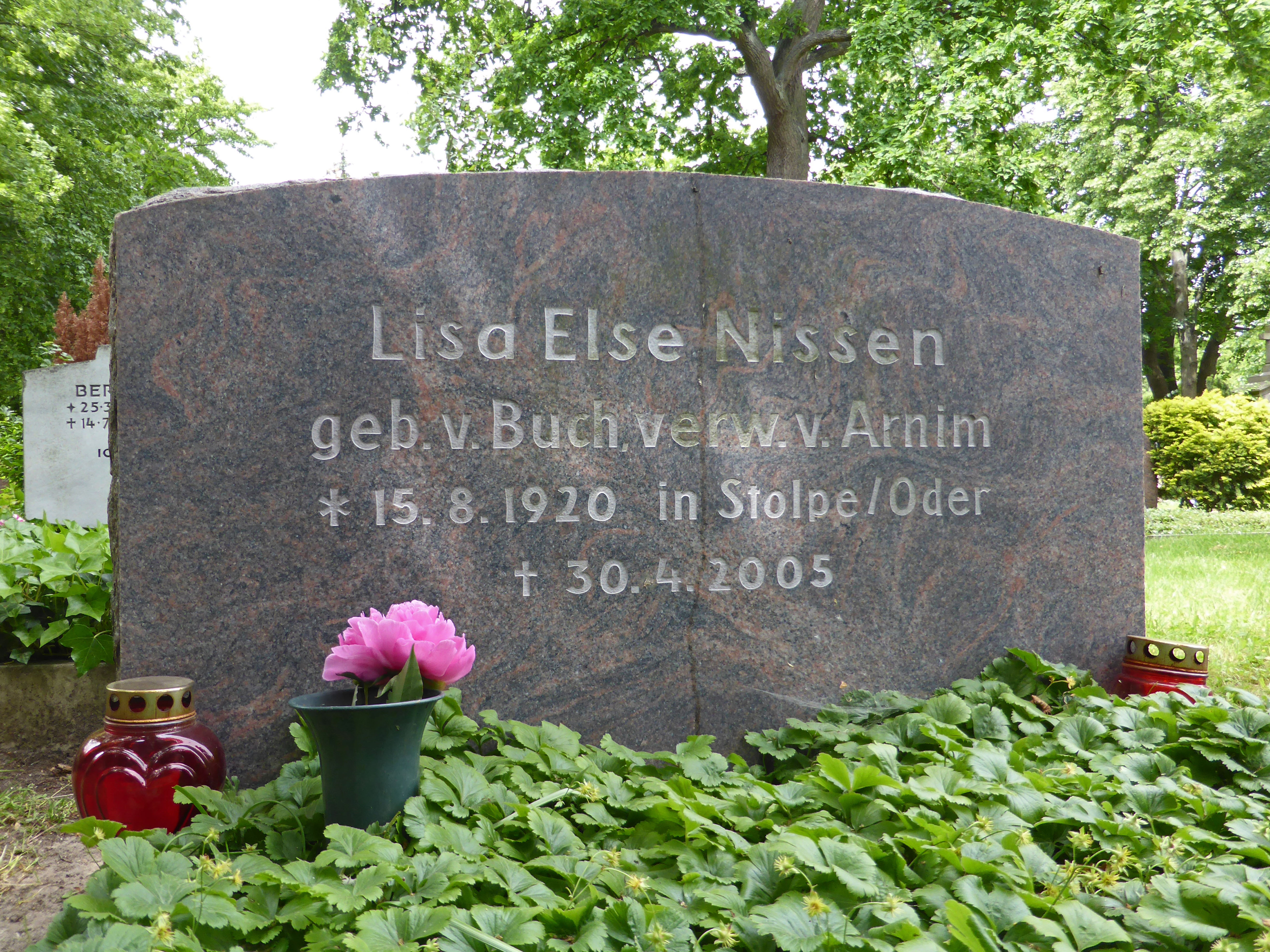 Grabstein von Lisa Else Nissen, geborene von Buch, verwitwete von Arnim (1920-2005), auf dem Friedhof in Wolfsburg, Stadtteil Rothenfelde. Unbelegt: Tochter von Johann Siegfried von Buch und Vera von Buch, Schwester von Johann-Georg Heinrich Erhard Valentin Karl Leopold Alexander von Buch, 1950 Otto von Arnim geheiratet, 5 Kinder u.a. Hubert Dietrich Hubert von Arnim und Hans von Arnim, spatter Uwe-Jens Nissen geheiratet.